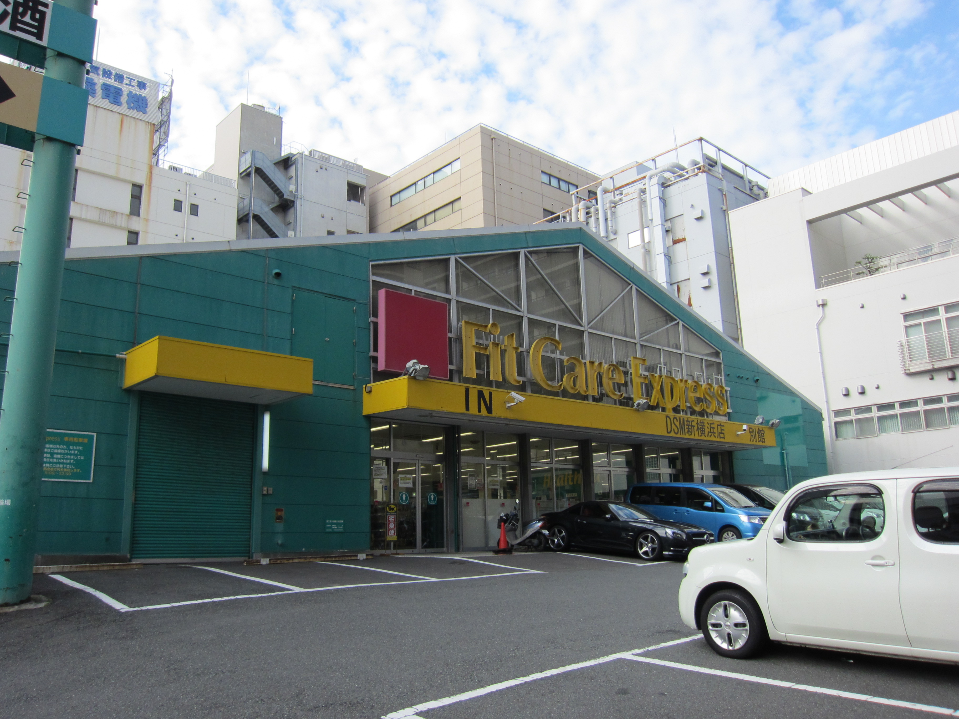 Fit Care Express DSM 新横浜店 別館